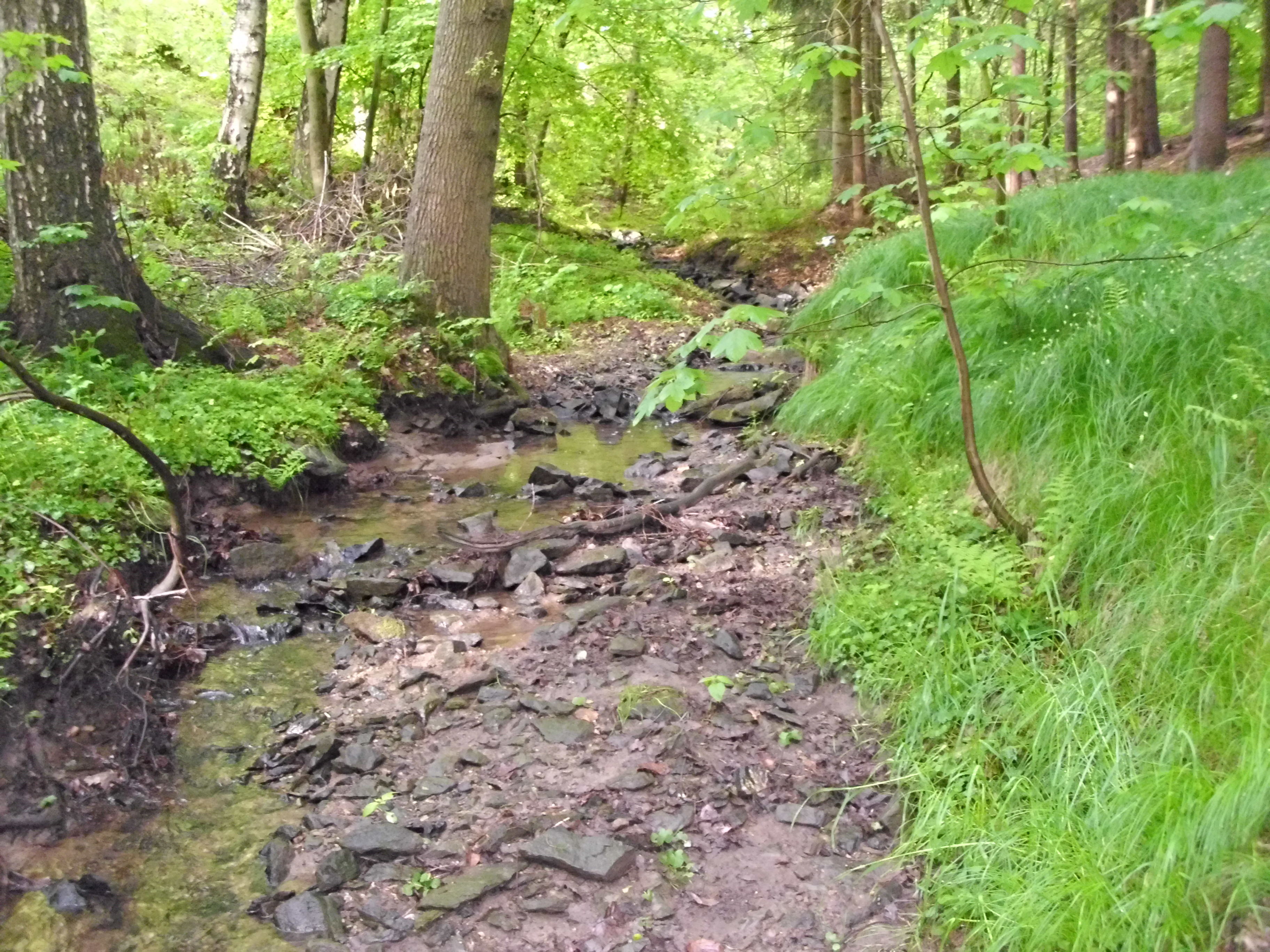 Dies Seitental der Weißeritz steht teilweise unter Landschaftsschutz und beginnt bei der Schule von Seifersdorf